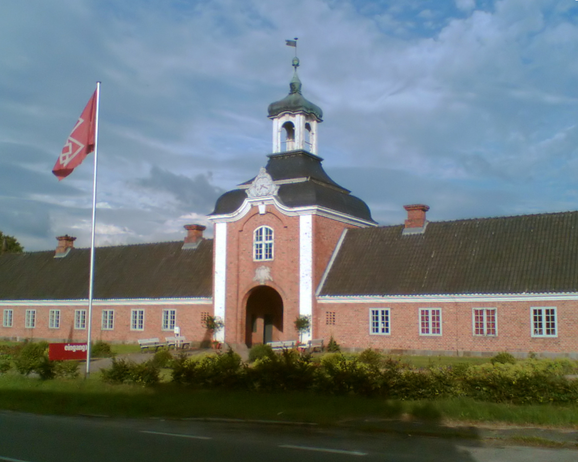 Torhaus des Schleswig-Holsteinischen Freilichtmuseums in Molfsee